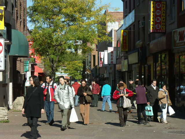 Rue de la Gauchetière, pedestrian section, Montreal. Photo by: User:Gene.arboit